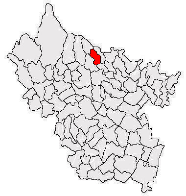 Categorie:Hărţi ale judeţului Buzău